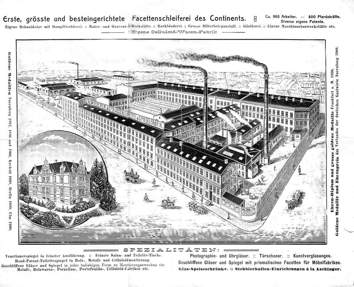 Werbeplakat der Firma Wiederer